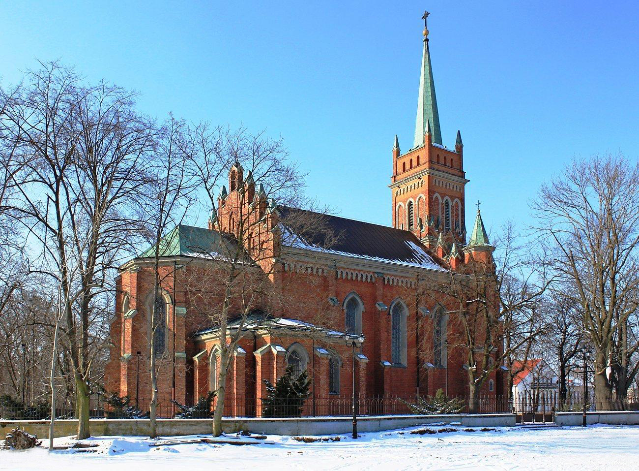 Kościół Wniebowzięcia Najświętszej Maryi Panny na osiedlu Zerzeń w dzielnicy Wawer.